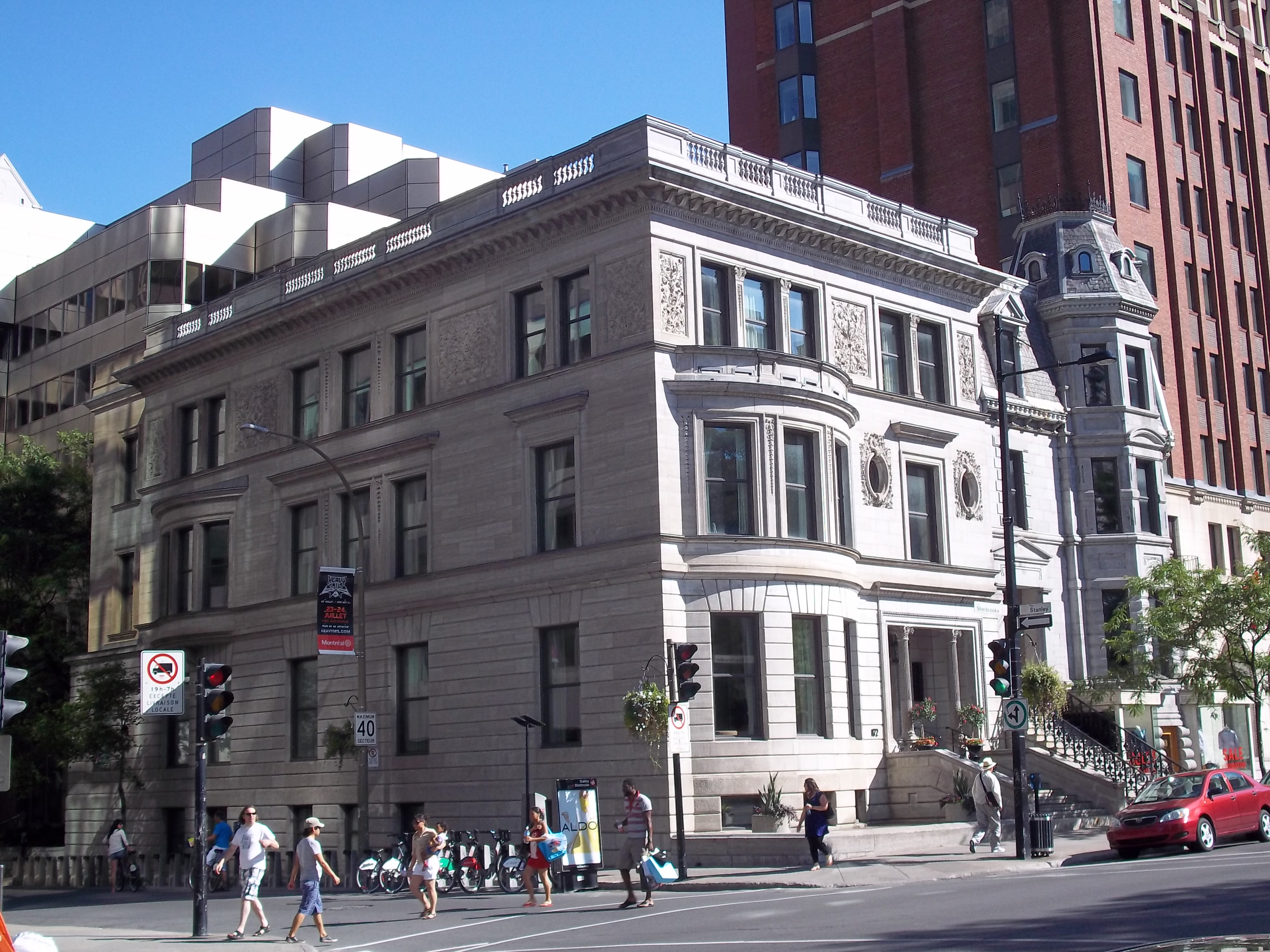 Maison Lord-Atholstan, 1172, rue Sherbrooke ouest, Montréal